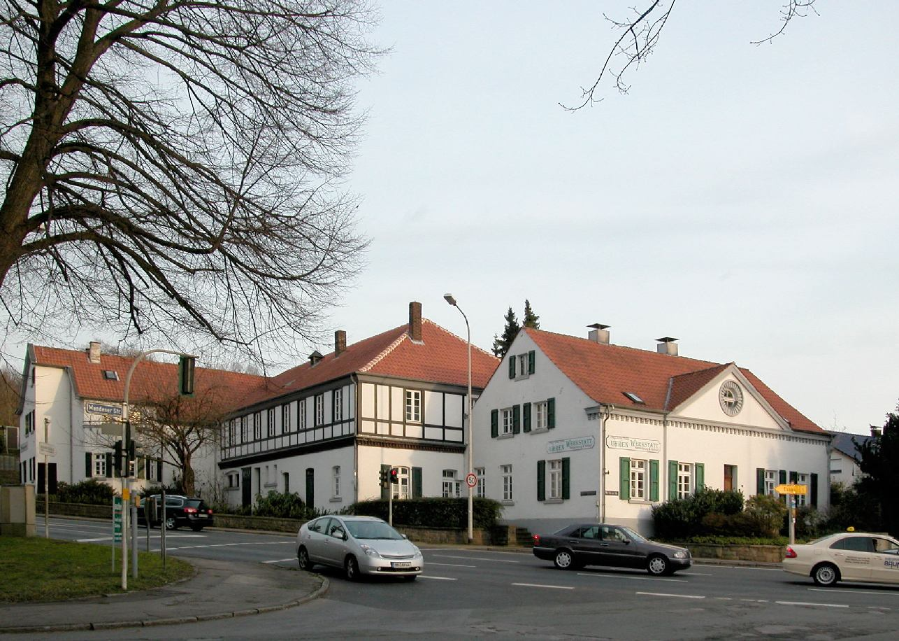 Alte Stadtgärtnerei in Mülheim Kamera-Position: Mendener Straße Objekt: 51°24′33.22″N 6°53′40.43″E / 51.4092278°N 6.8945639°E